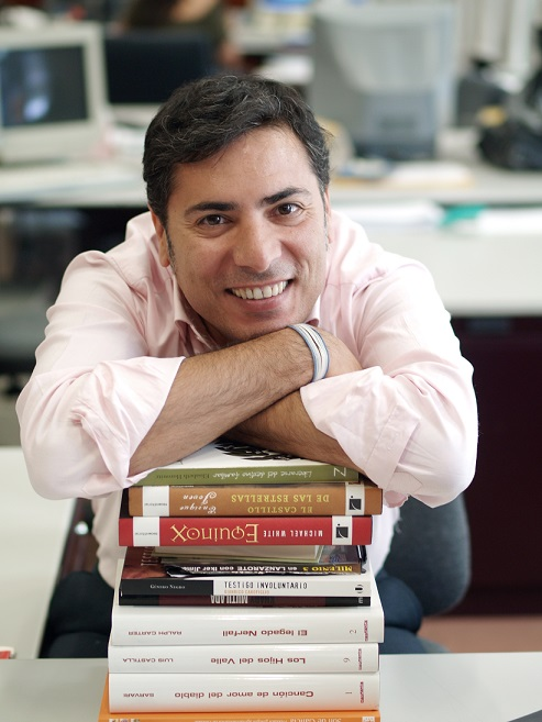 Alberto Granados